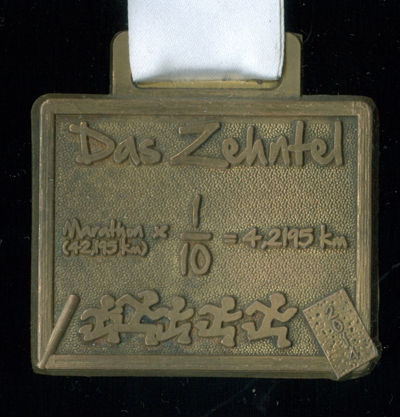 Medaille für Finisher des Zehntelmarathons